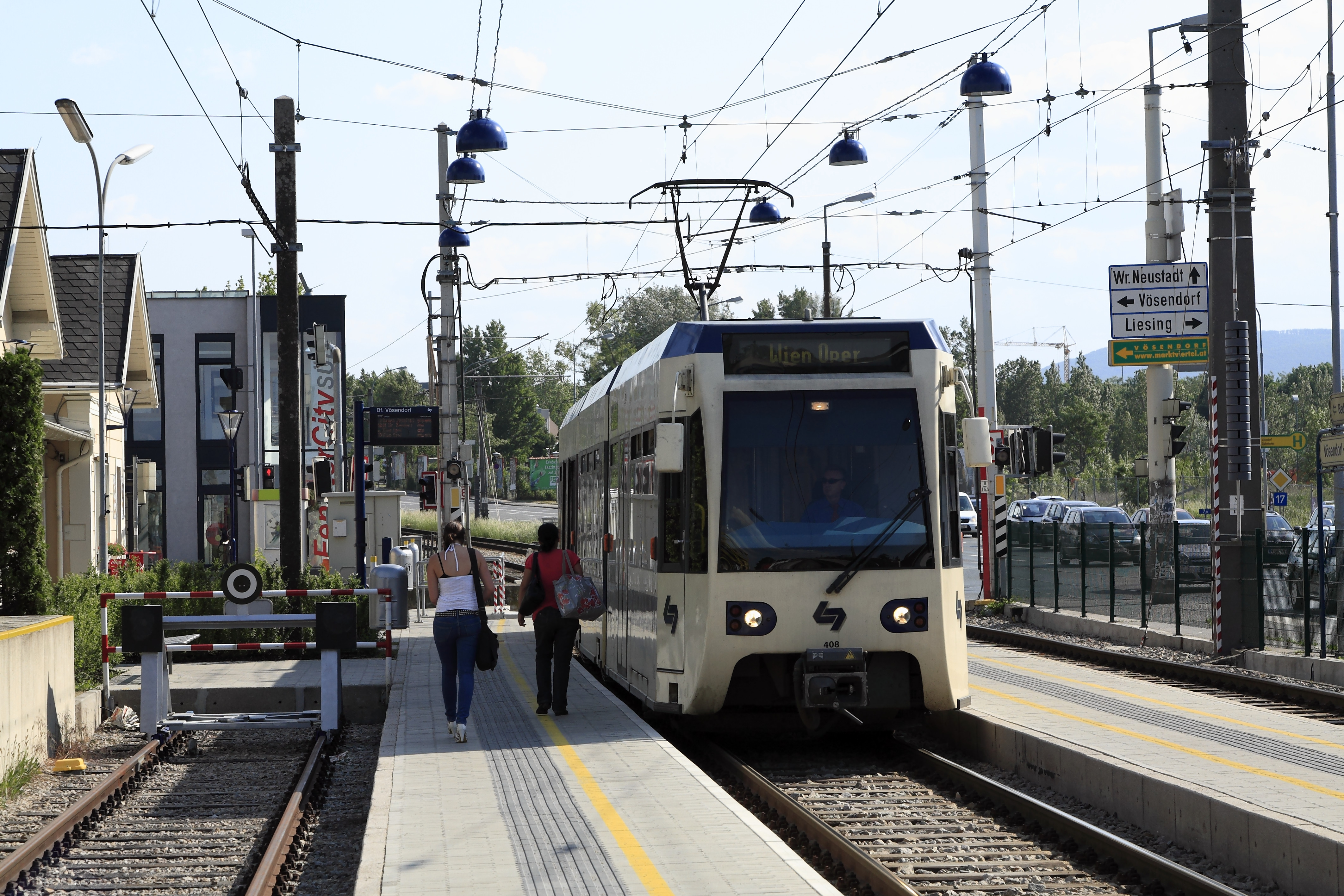 Personenzug Richtung Wien, einzelnfahrende Triebwagen der Reihe 400 sind schon wegen ihrer Anzahl relativ selten.